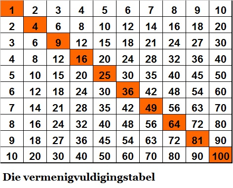 Vermenigvuldigingstabel